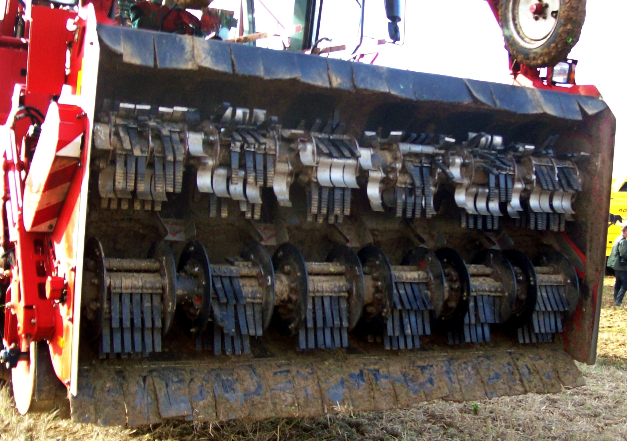 Rübenroder mit Entblatterer (Grimme)